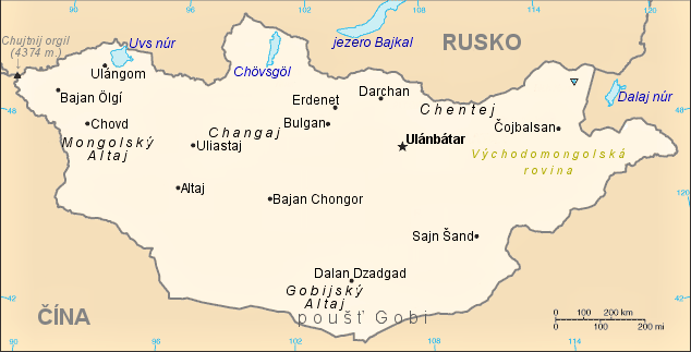 Orientační mapa Mongolska.